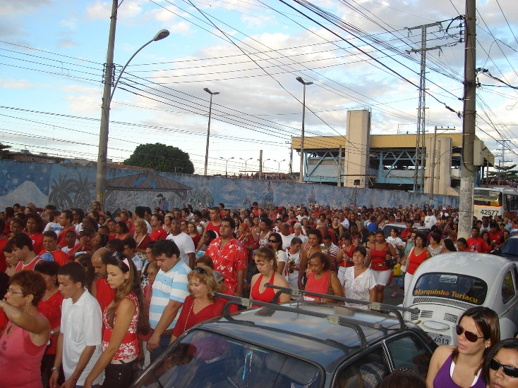 Procissão de São Jorge, em Quintino, Rio de Janeiro - RJ, 2008.